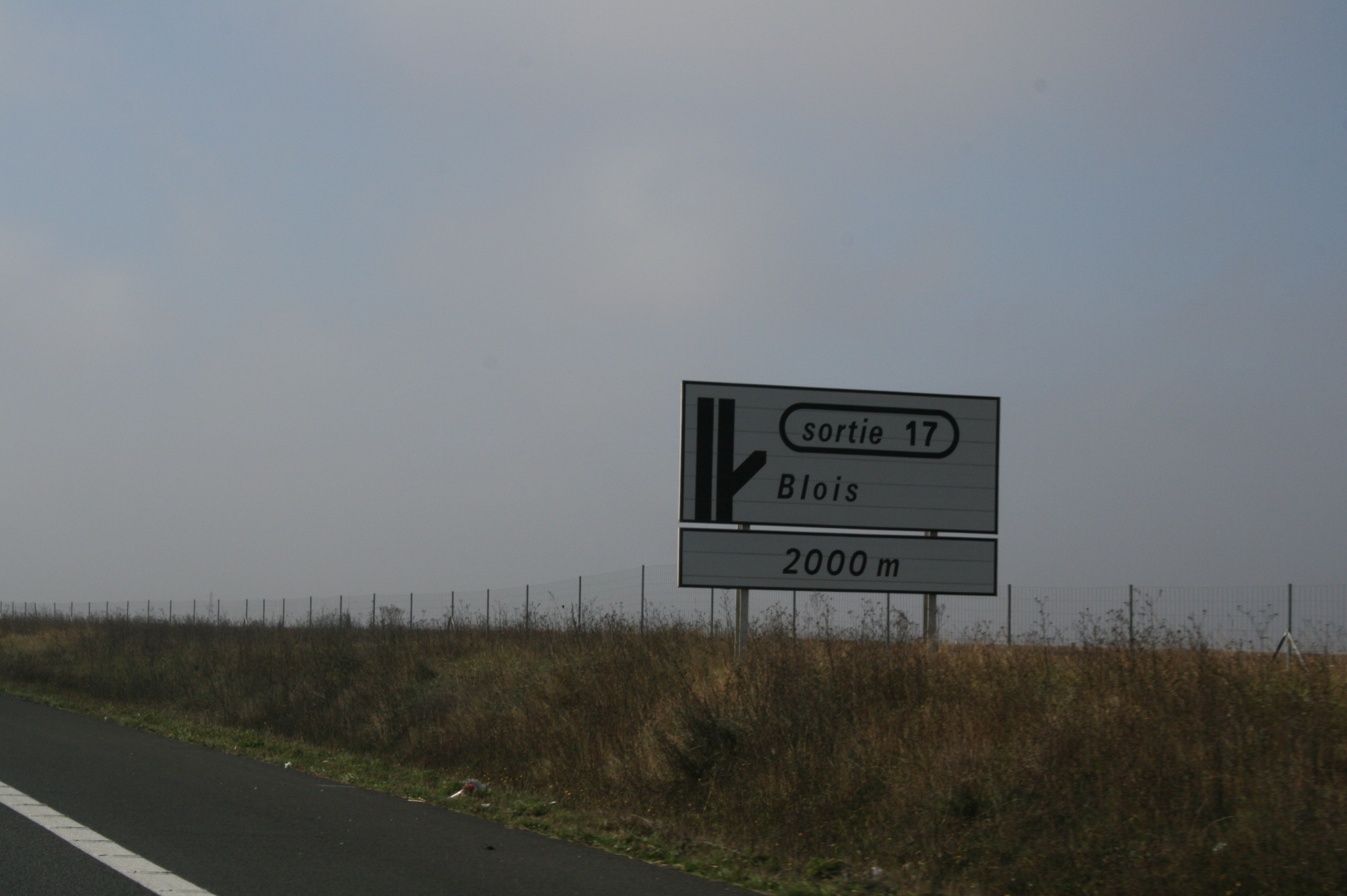 Panneau D51a de signalisation d'avertissement sur autoroute - ancien modèle (France)